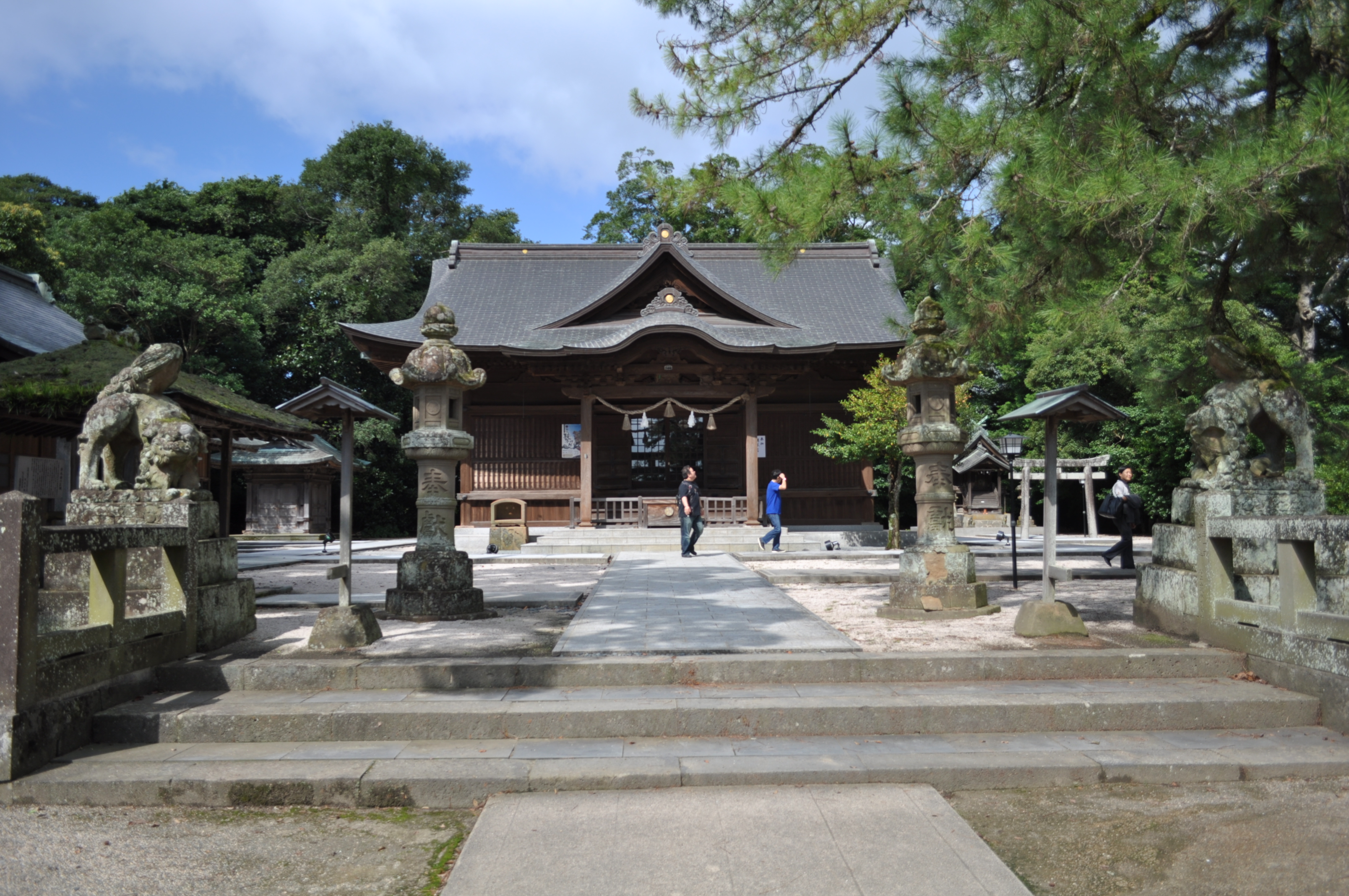 （2015年9月11日撮影）